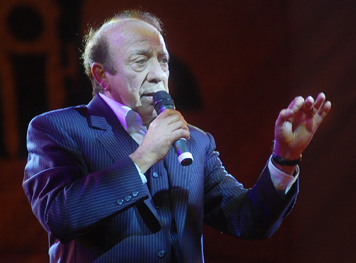 Buddy Richard (* Graneros, Chile, 21 de septiembre de 1943) es el seudónimo del cantautor chileno Ricardo Roberto Toro Lavín. Su apodo se compone de dos nombres; Buddy por el cantante Buddy Holly, pionero del rock and roll, y Richard por su nombre verdadero, Ricardo. En la comuna de Maipú miles de personas festejan el Bicentenario de nuestra patria con numerosos artistas, bailes y colores durante la 4ta Semana Chilenidad.